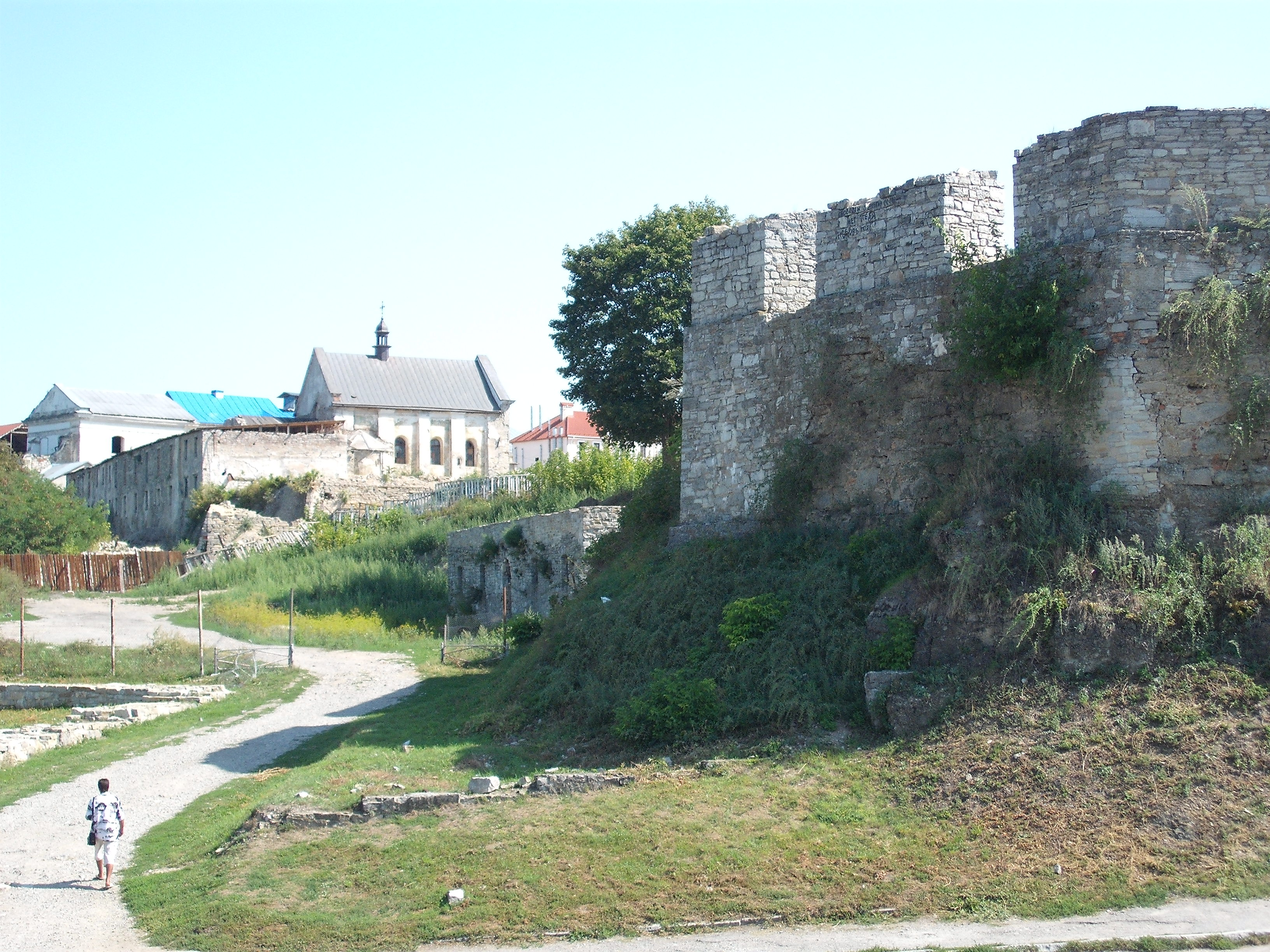 Kamieniec Podolski, umocnienia miejskie